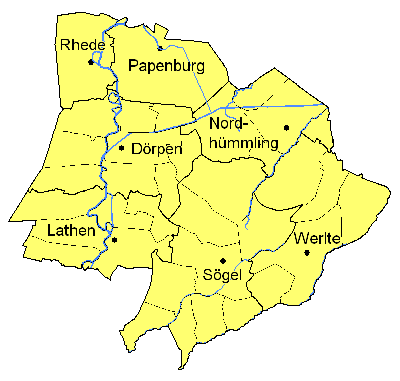 Der Landkreis Aschendorf-Hümmling nach der Gemindereform 1974.